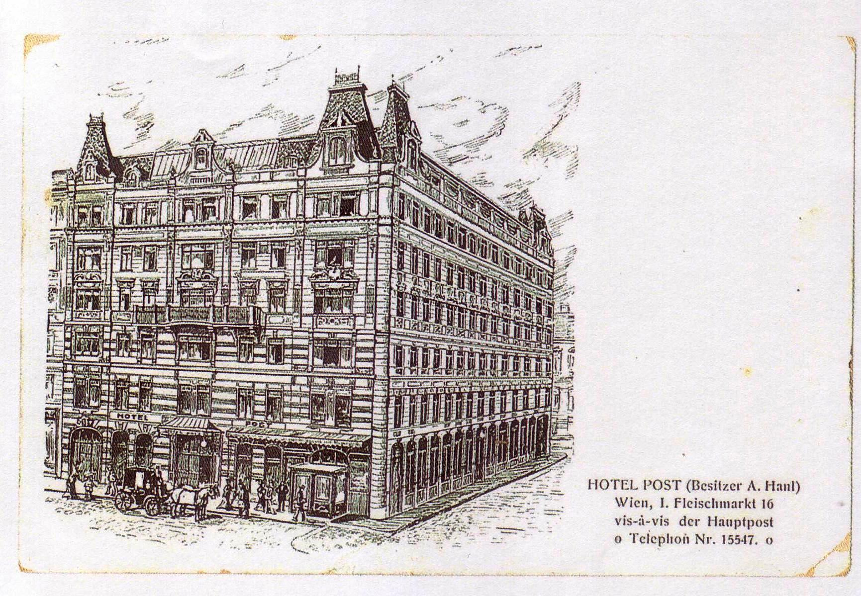 Κάρτα του ξενοδοχείου POST της Βιέννης όπου διέμεινε ο παπα-Σταύρος Τσάμης